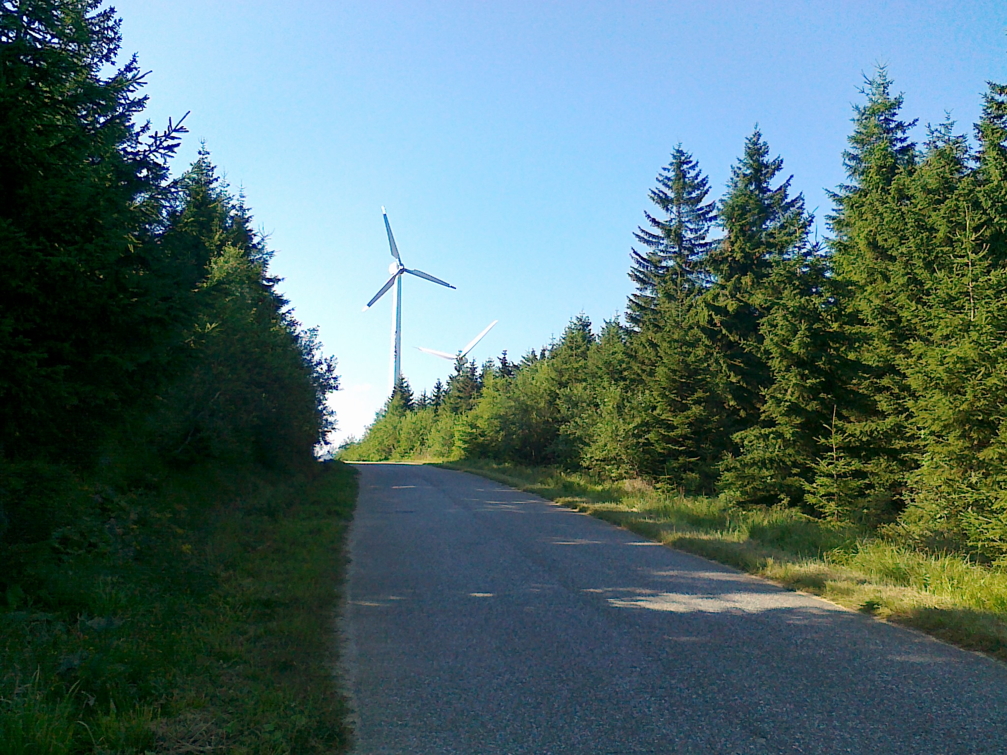 Widok ze ścieżki rowerowej nr 6155 na wieże - turbiny wiatrowe na połaci szczytowej Medvědí hora